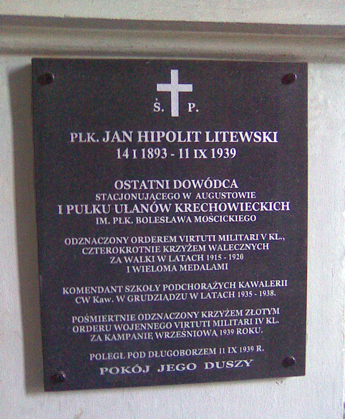 Tablica pamiątkowa płk. Jana Hipolita Litewskiego w krużgankach kościoła p. w. Św. Antoniego z Padwy przy ul. Senatorskiej 31 w Warszawie